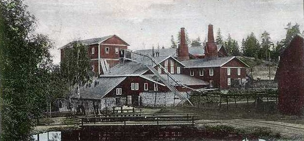 Bredsjö, masugnen.